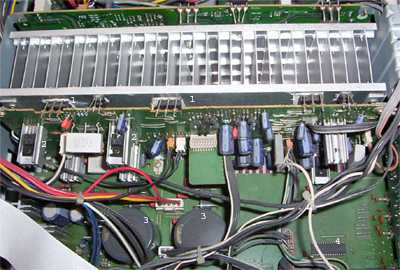 Endstufe eines HK AVR41